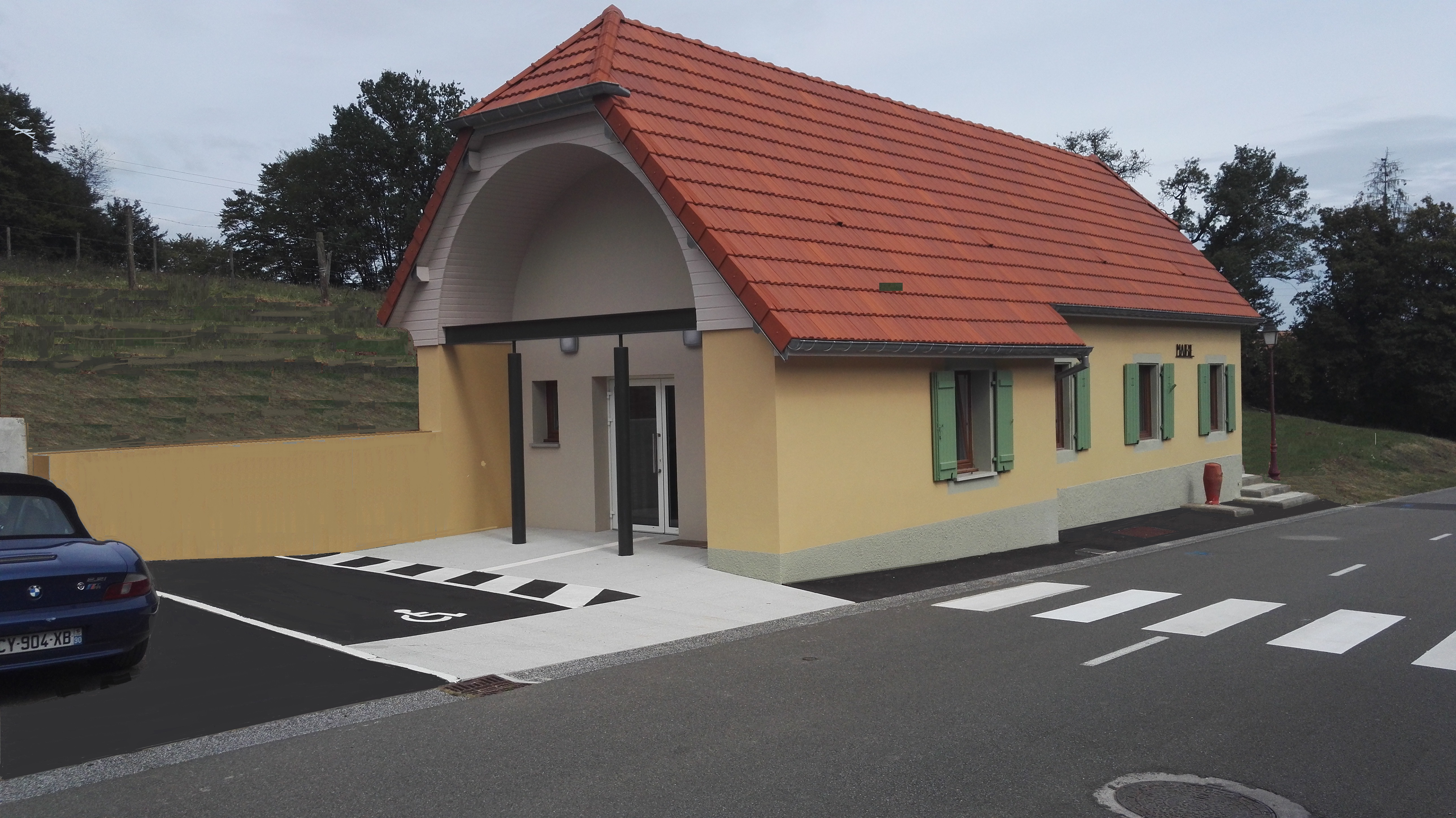 la nouvelle mairie de Botans